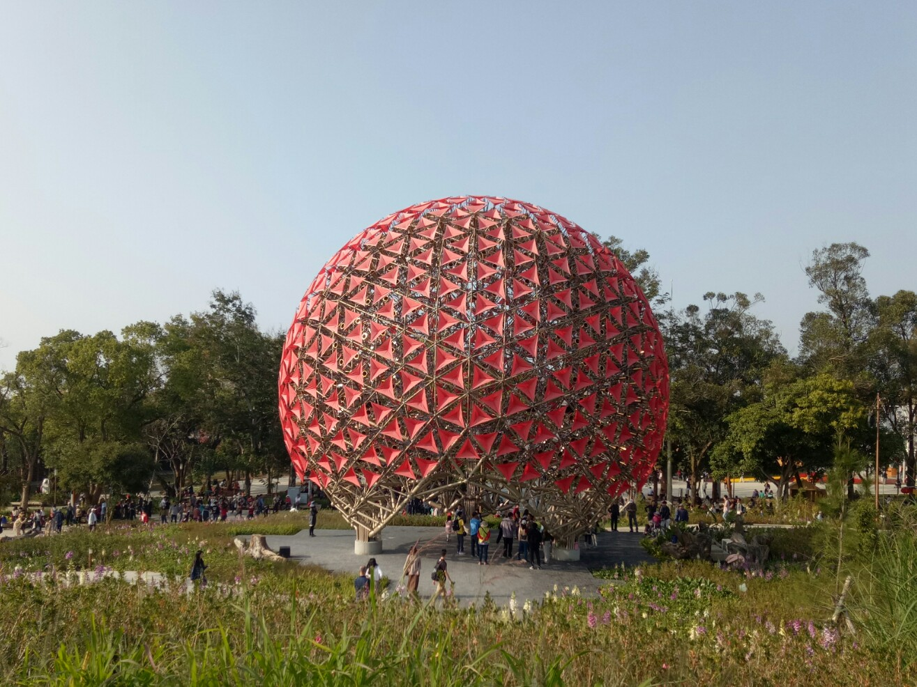 2018年臺中世界花卉博覽會，后里森林園區 - "聆聽花開的聲音"。